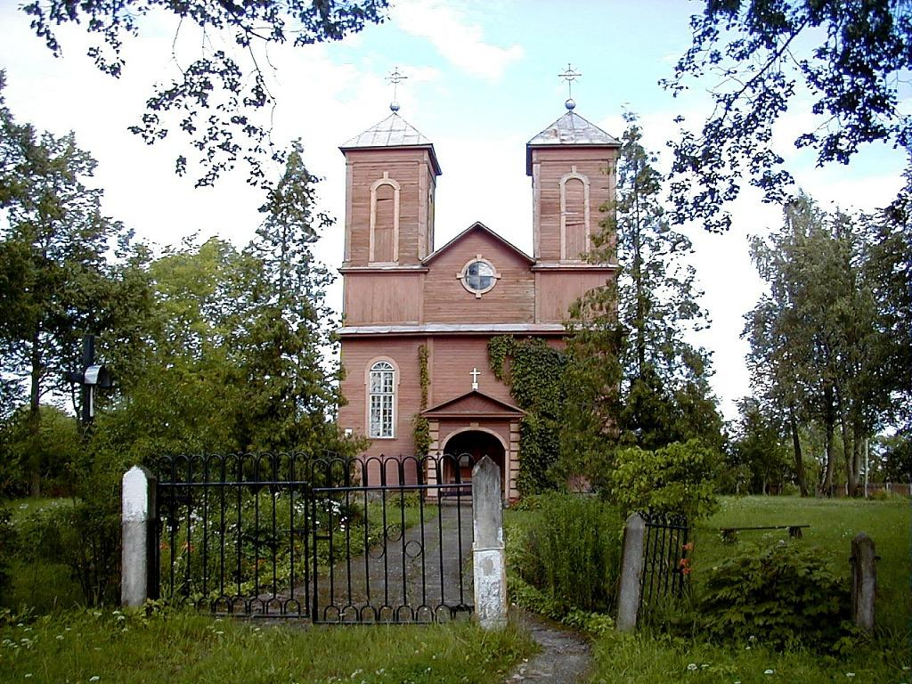 Zilupes katoļu baznīca 2000-07-22